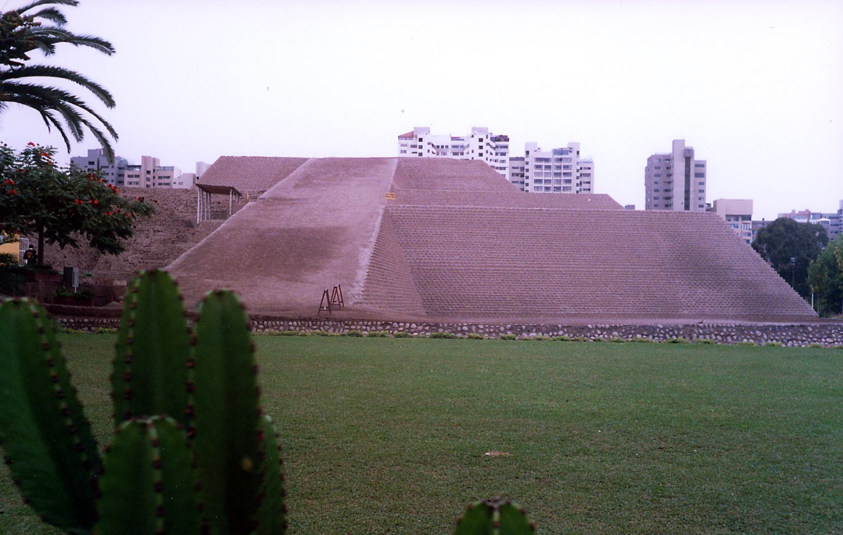 Huallamarca, San Isidro, Lima, Peru